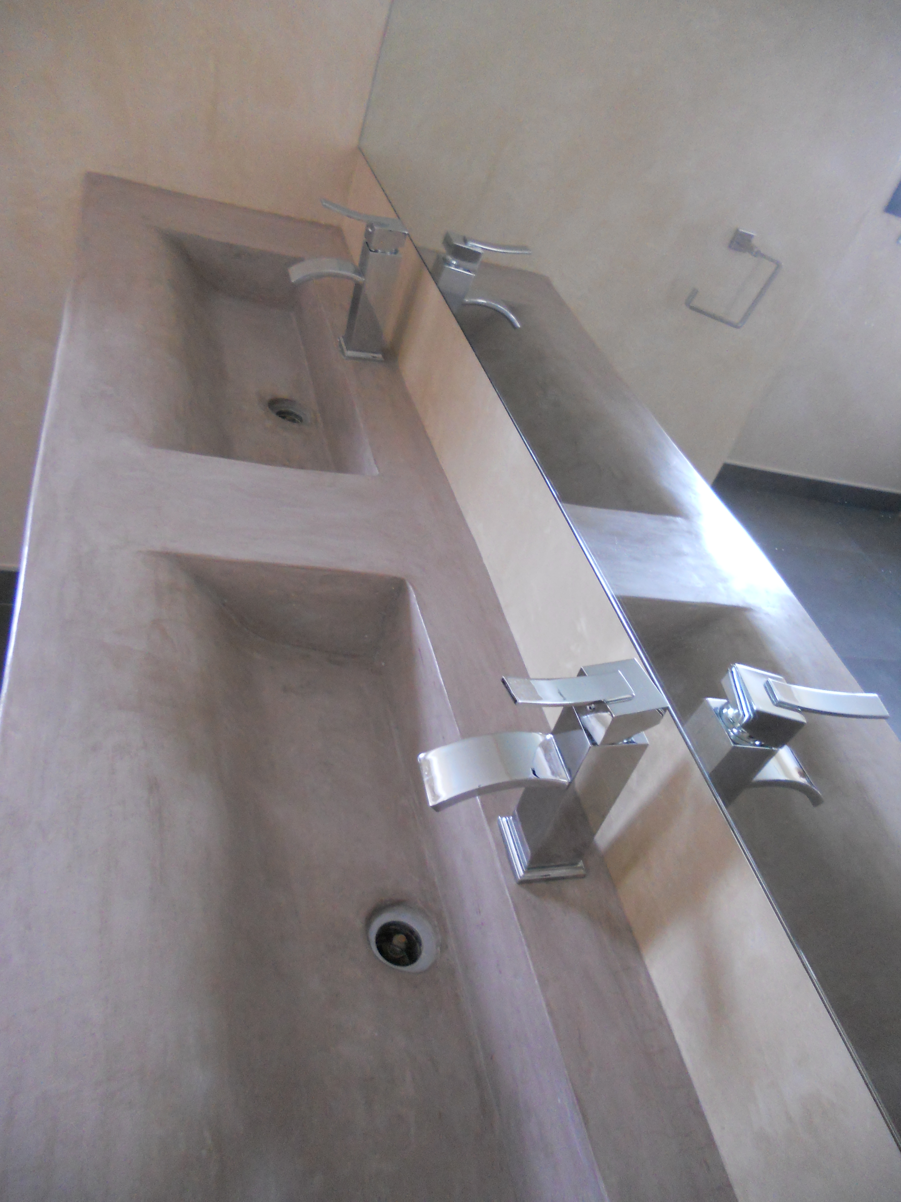 tablette en tadelakt